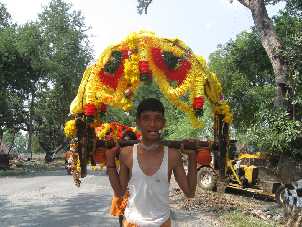 வாயில் அலகு குத்திய நிலையில் காவடி சுமந்து வரும் ஒரு சிறுவன்.